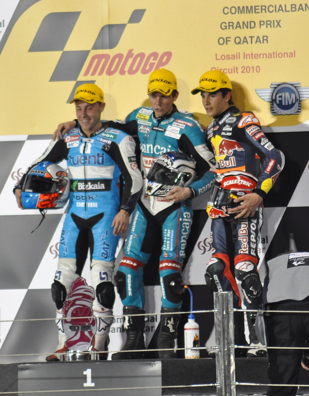 Podium Moto GP 2010